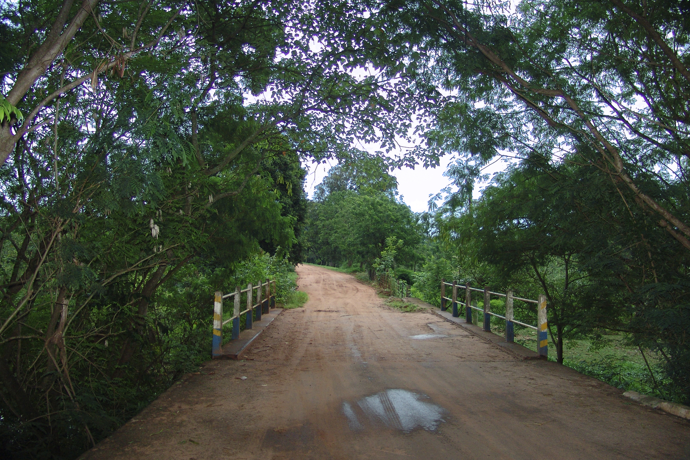 Rodovia do estado de São Paulo, SP-251 (Chico Landi), Avaré, São Paulo, Brasil